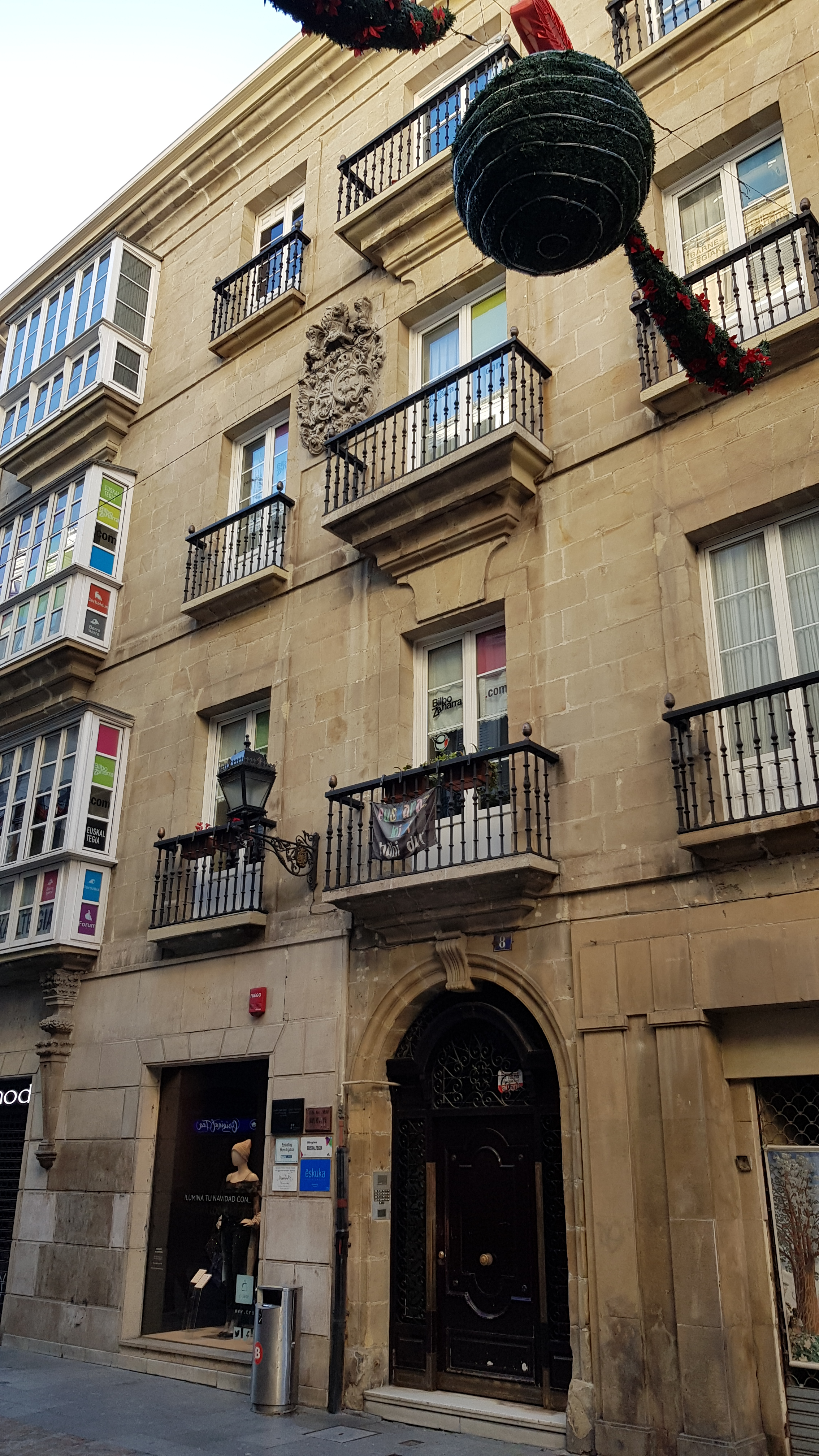 Gortazar jauregia